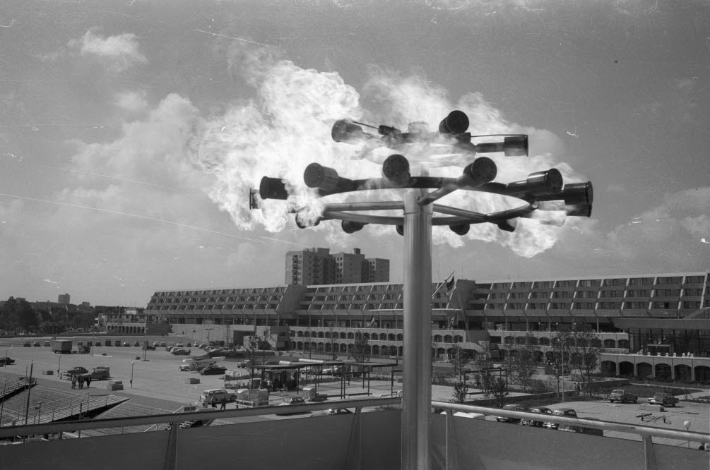 Die modern gestaltete Apparatur für die olympische Flamme wird getestet.